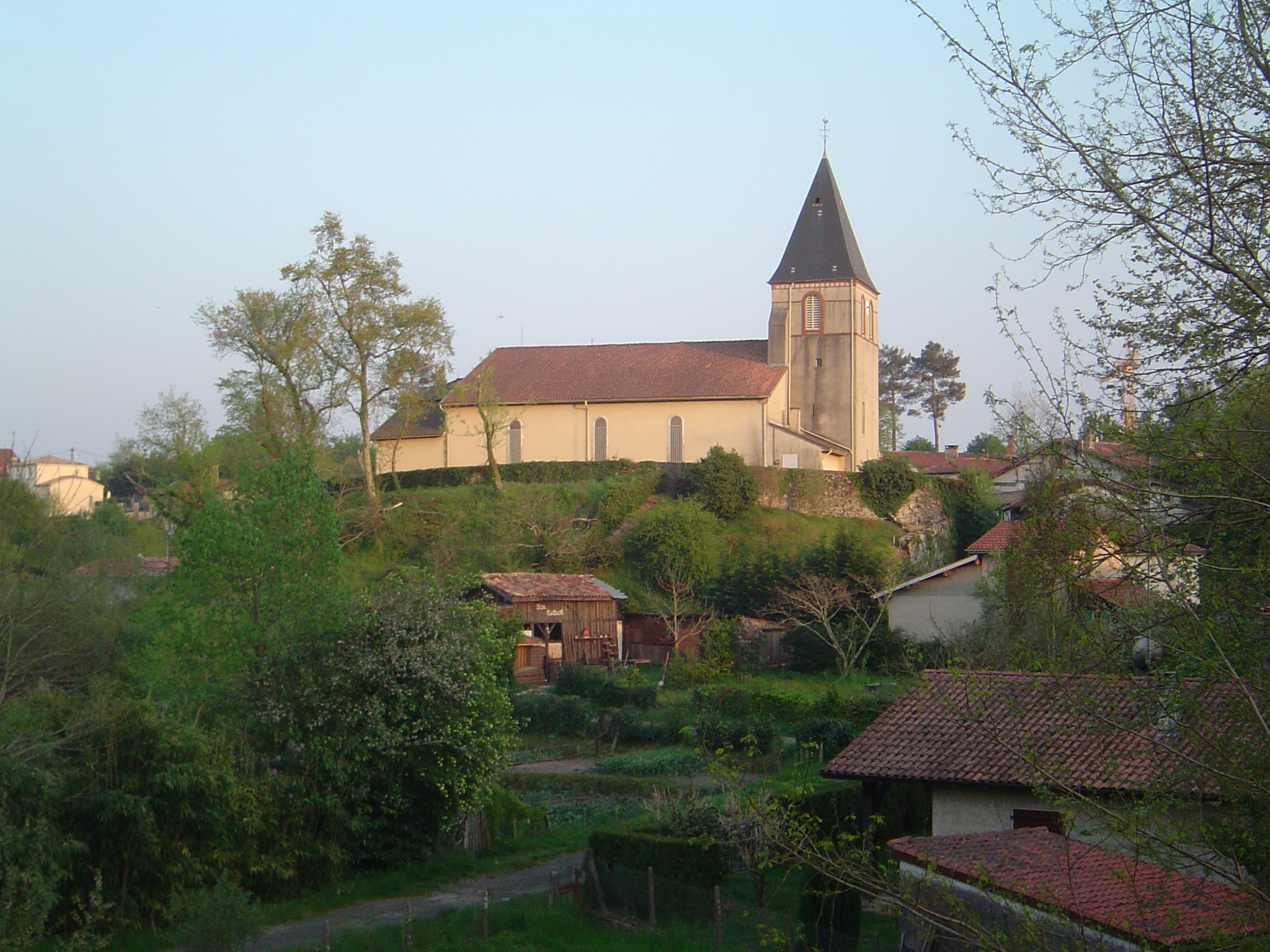 Glèsa de Castèths ; Maransin ; Gasconha